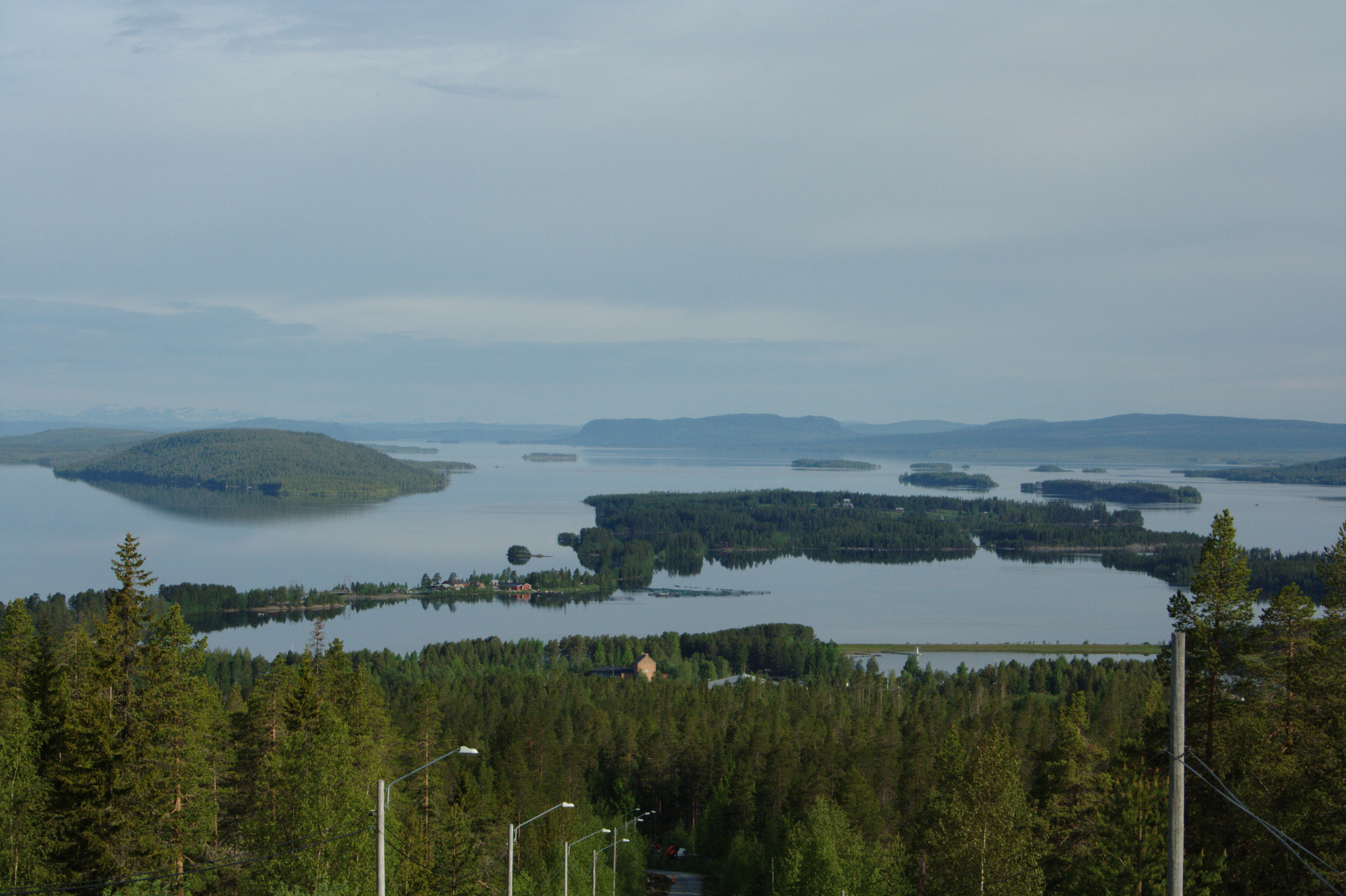 Utsikt från Utsikten på Stenseleberget i Storuman